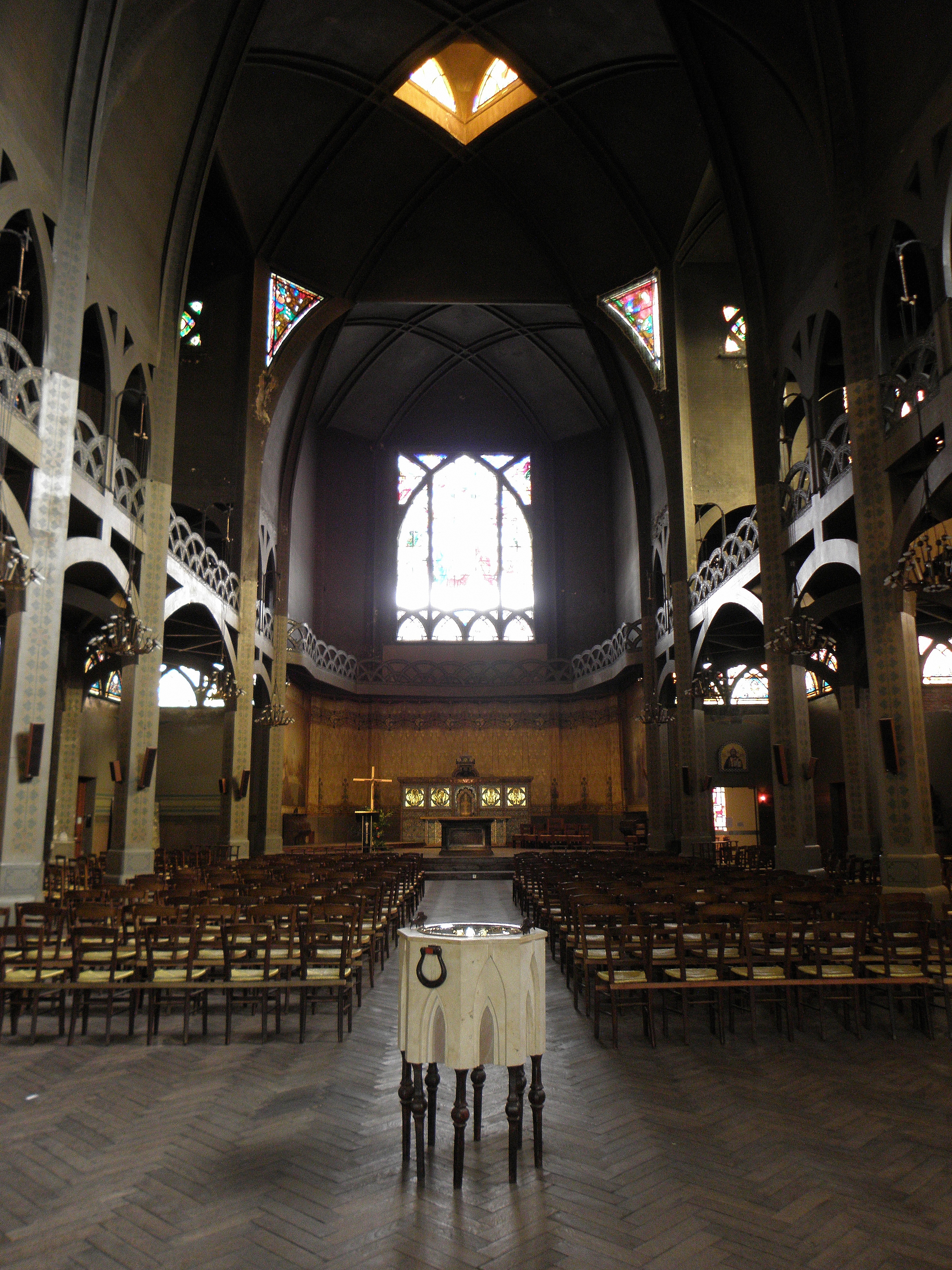 Intérieur de l'église Saint-Jean de Montmartre à Paris (75018). .